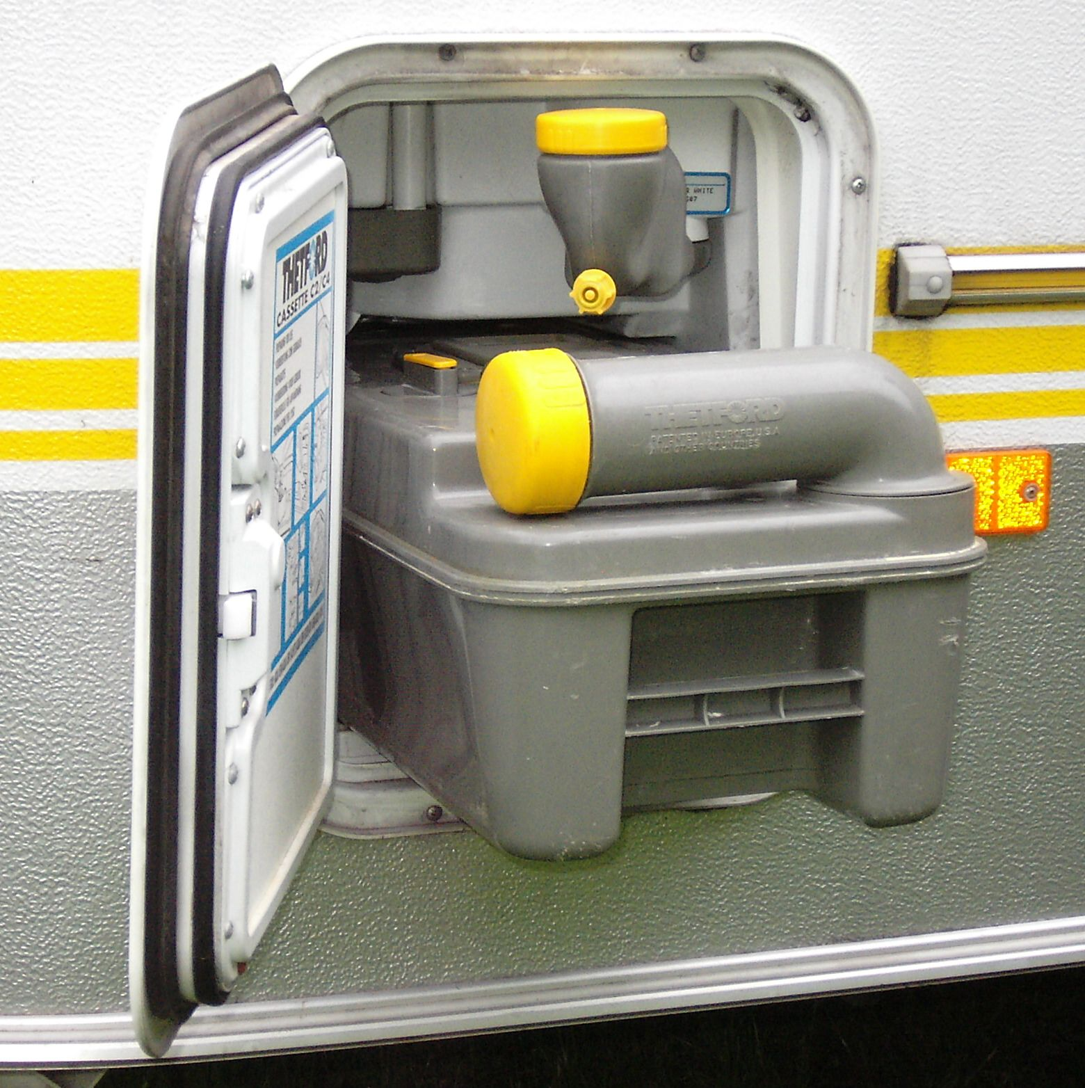 Kassettentoilette mit Serviceklappe